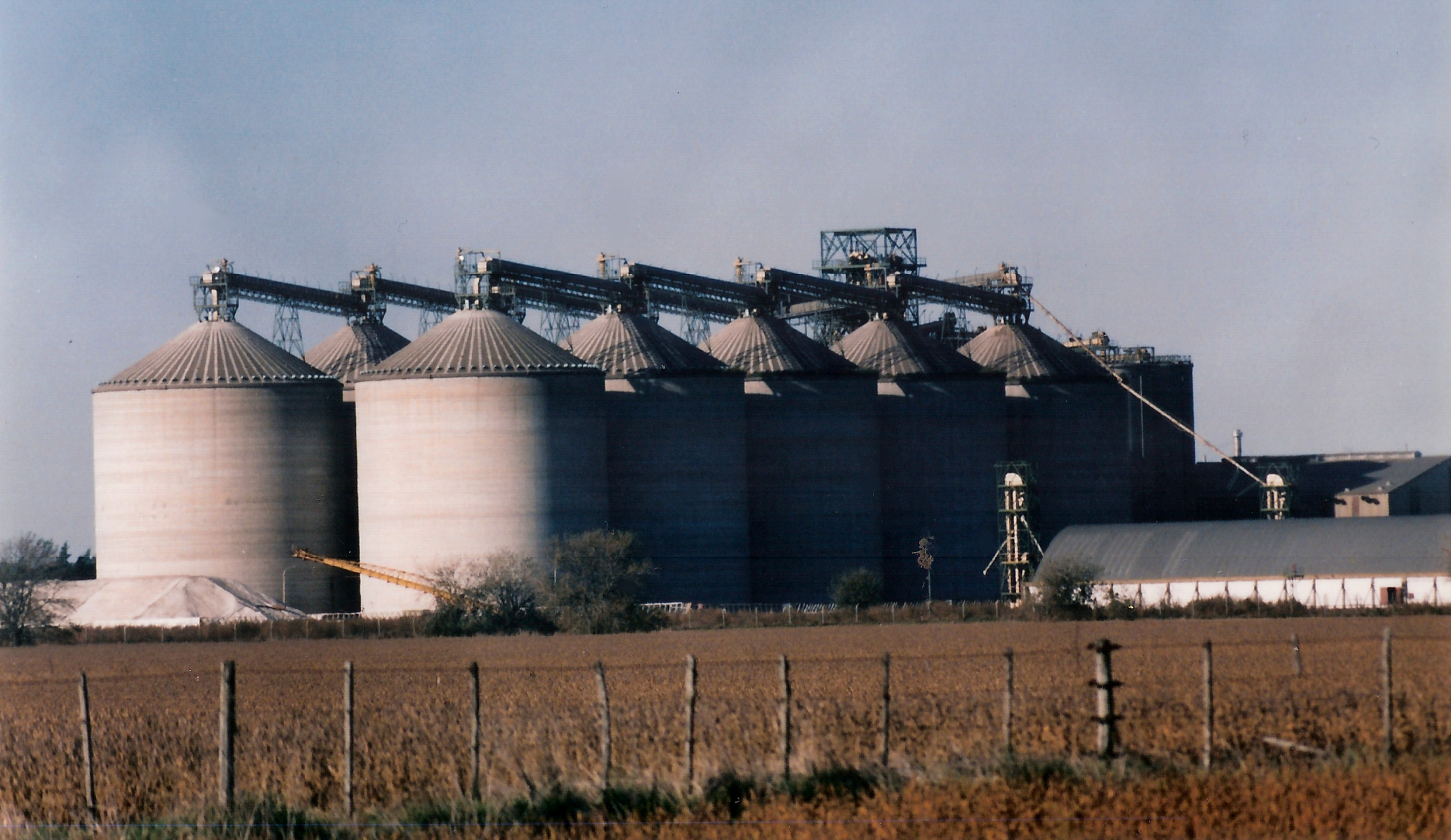 Planta industrial de Nidera en la ciudad de Junín, Argentina.